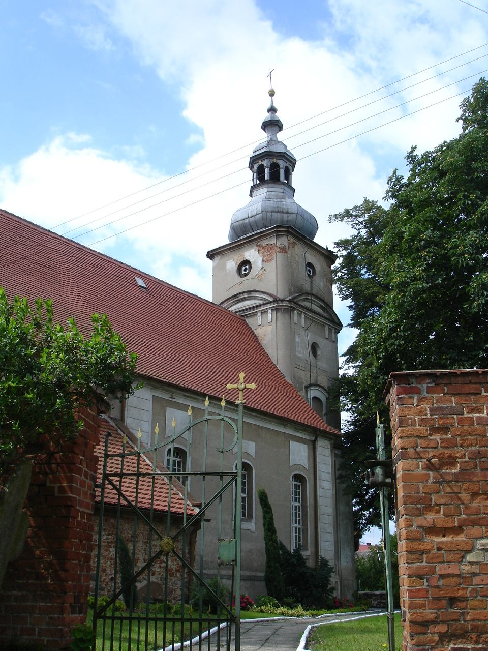 Wierzbnik - rzymskokatolicki kościół parafialny p.w. św. Michała Archanioła, XIV/XV, 1766